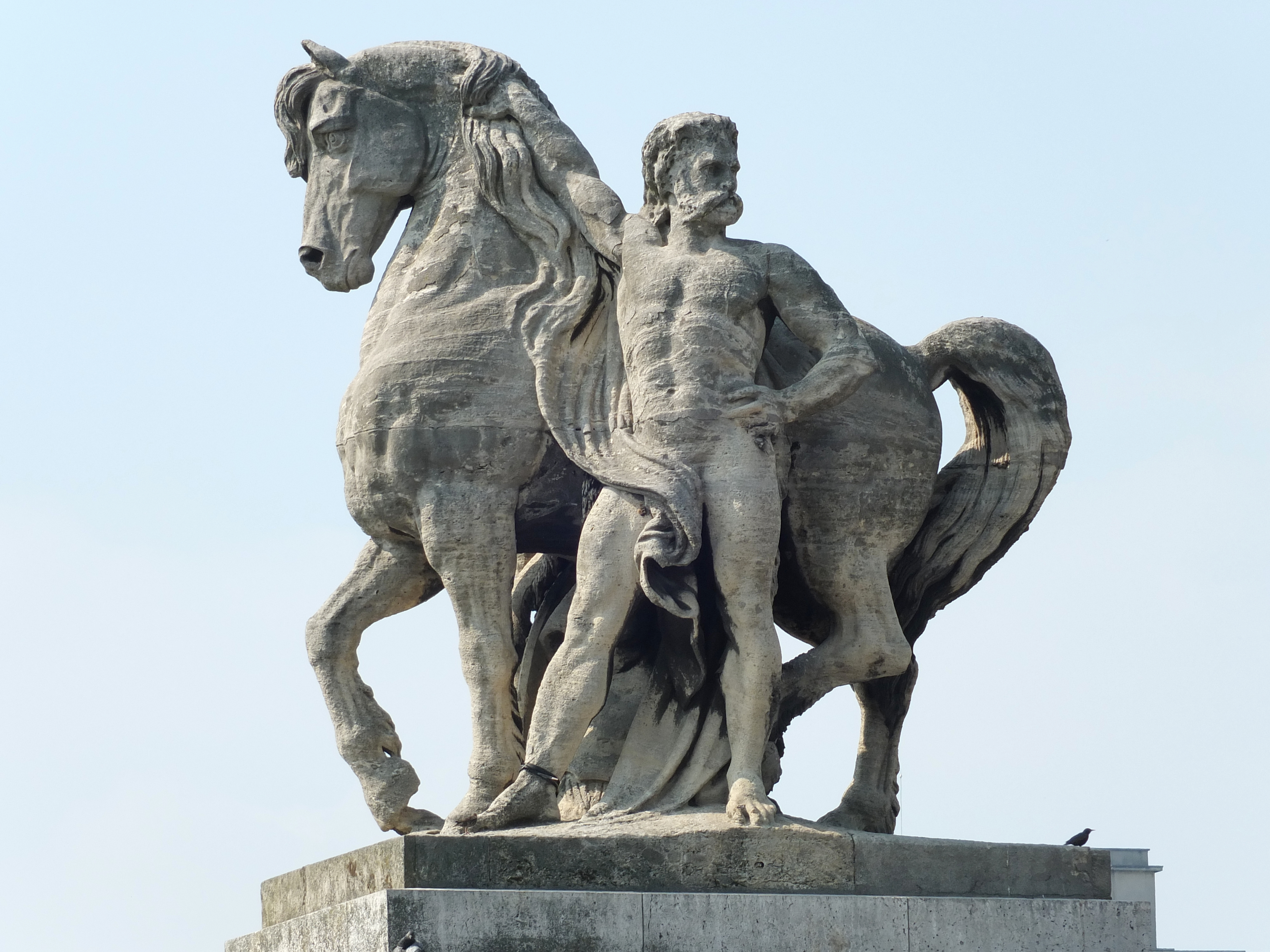 Pont d'Iéna, Paris, cavalier gaulois rive gauche, coté amont. Sculpture en calcaire d'Antoine-Augustin Préault (1809-1879), installé en 1853.